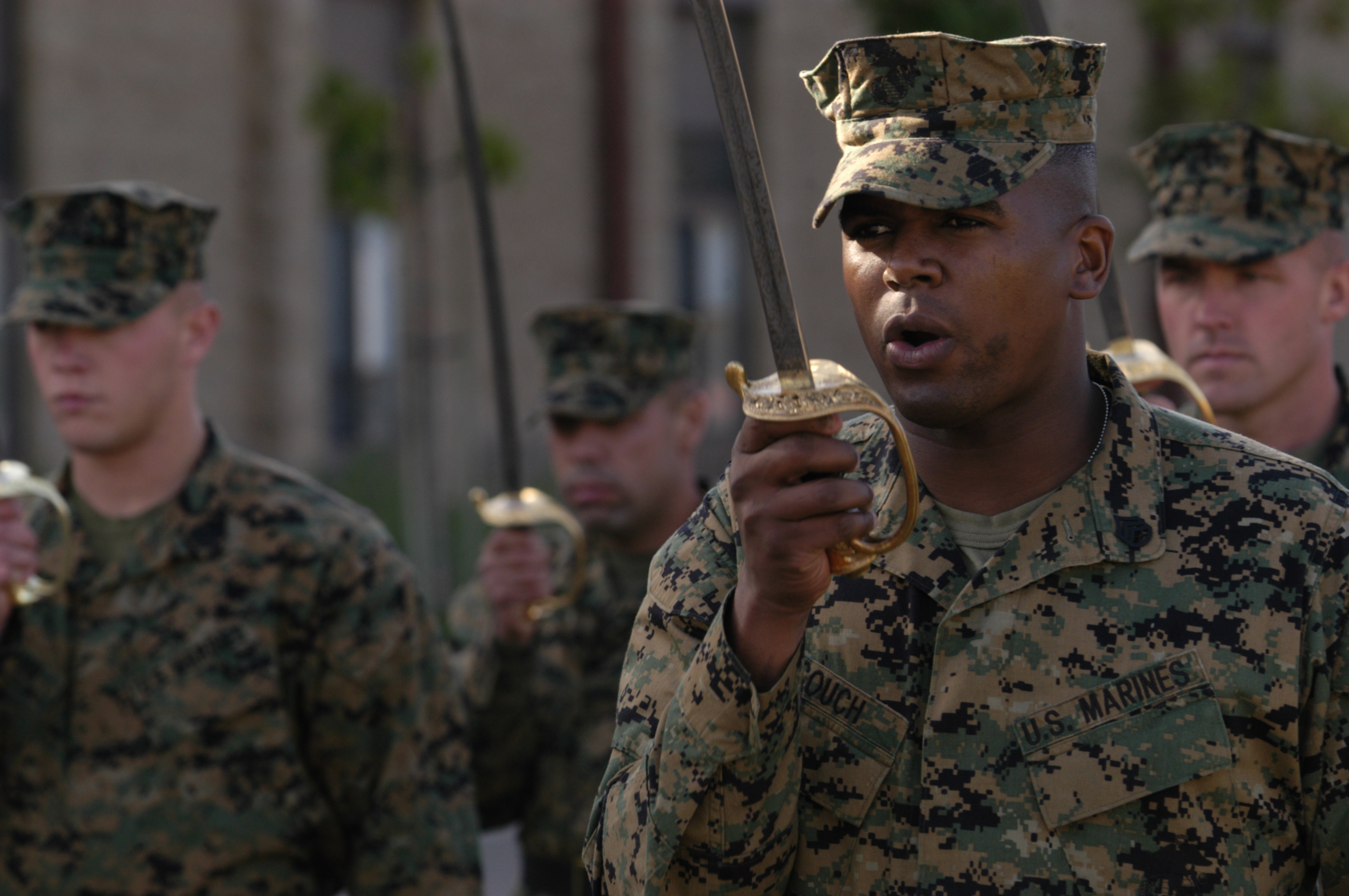 Amerikanske marineinfanterister gjør honnør med sabel.